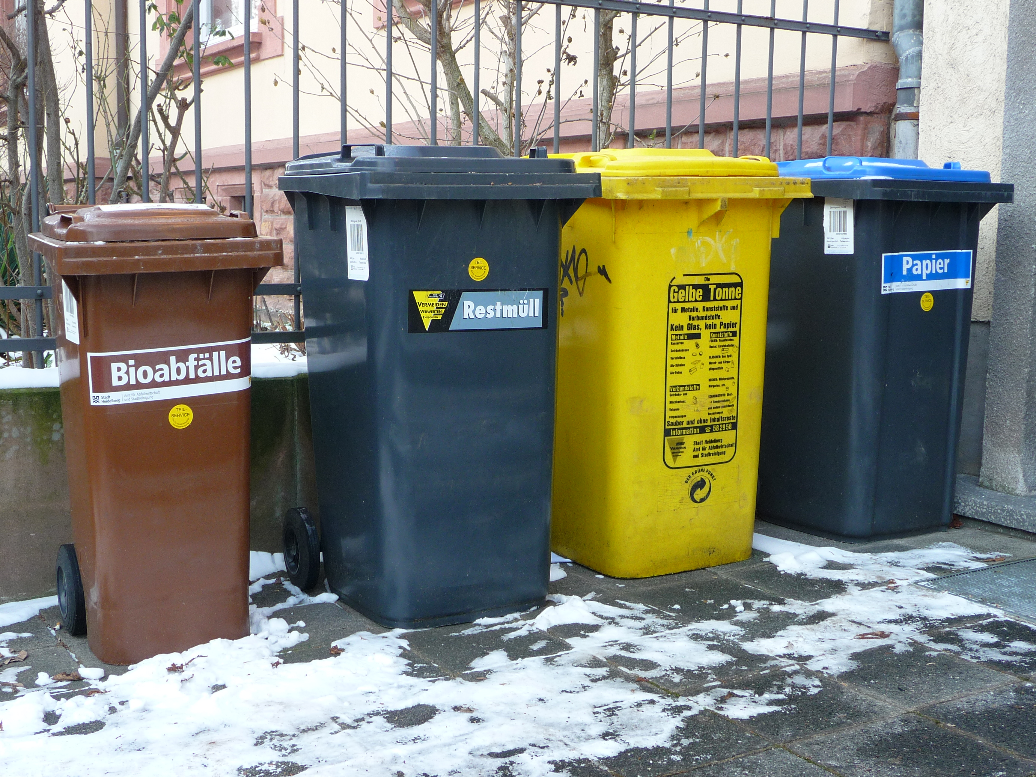 Mülltonnen (in Heidelberg): von links nach rechts: 80 l Biomüllgefäß, 240 l Restmüllgefäß, 240 l Gelbe Tonne (Verpackungen-Grüner Punkt), 240 l Papiergefäß.Von rechts nach links: 240 l Papiergefäß,240 l Gelbe Tonne (Verpackungen-Grüner Punkt),240 l Restmüllgefäß,80 l Biomüllgefäß